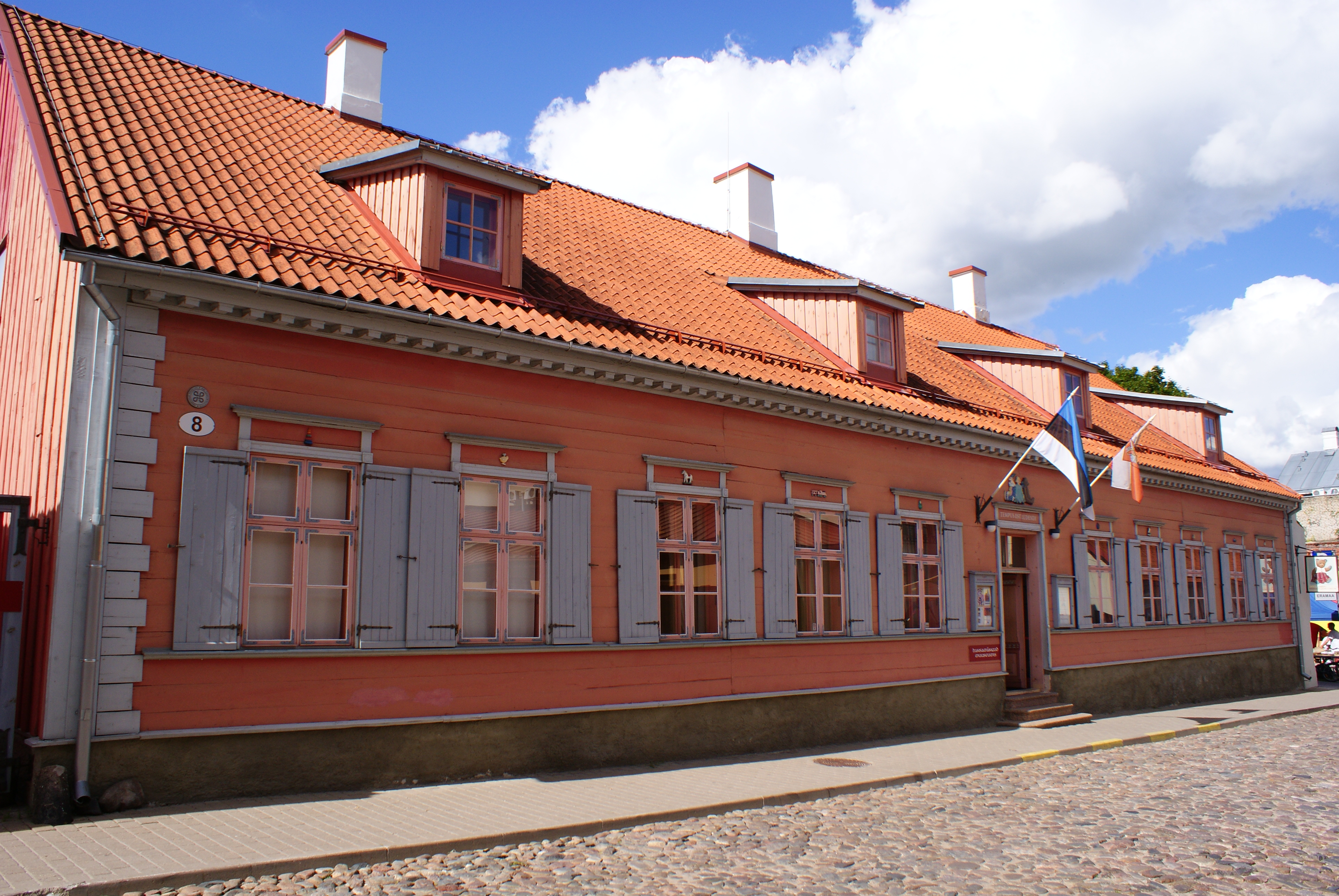 Elamu Tartus Lutsu 8